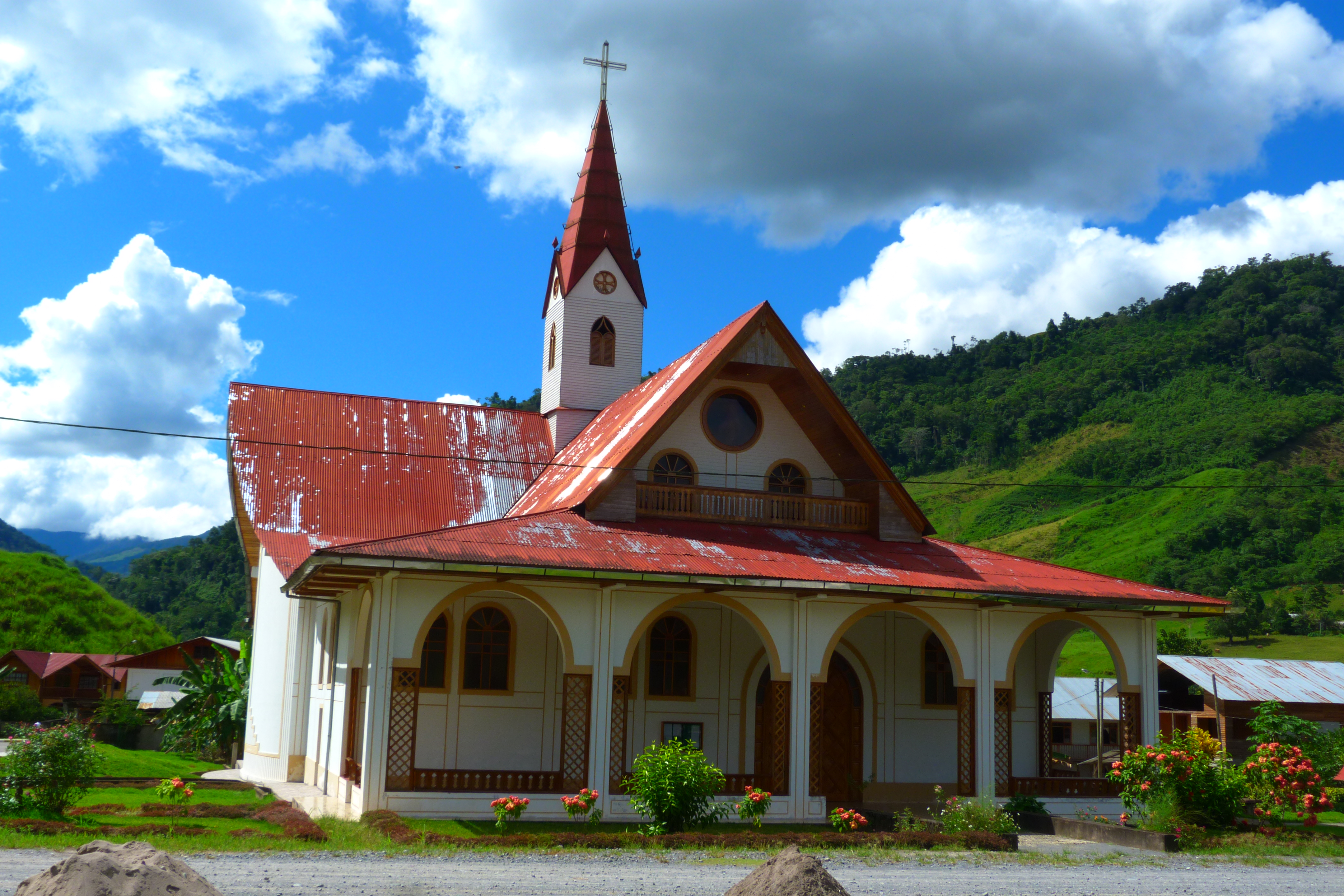 Vistas de la colonia Austro alemana de Pozuzo, Pasco, Perú